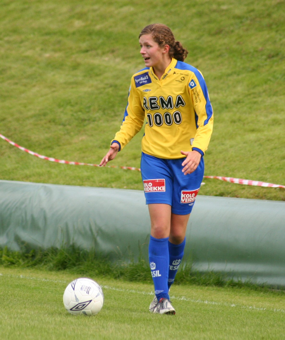 Fotballspilleren Linn Nyrønning